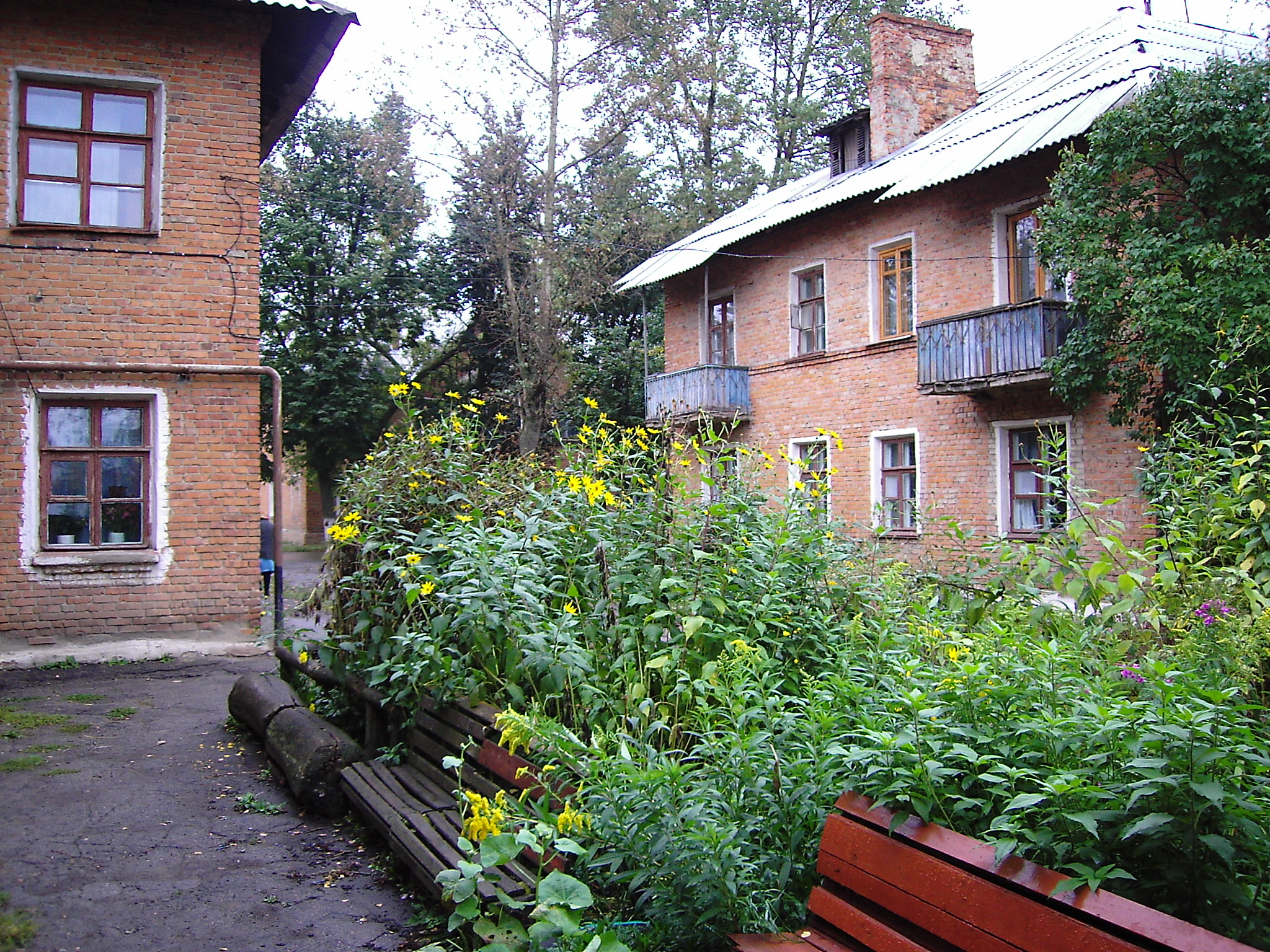 Двор в г. Сокольники